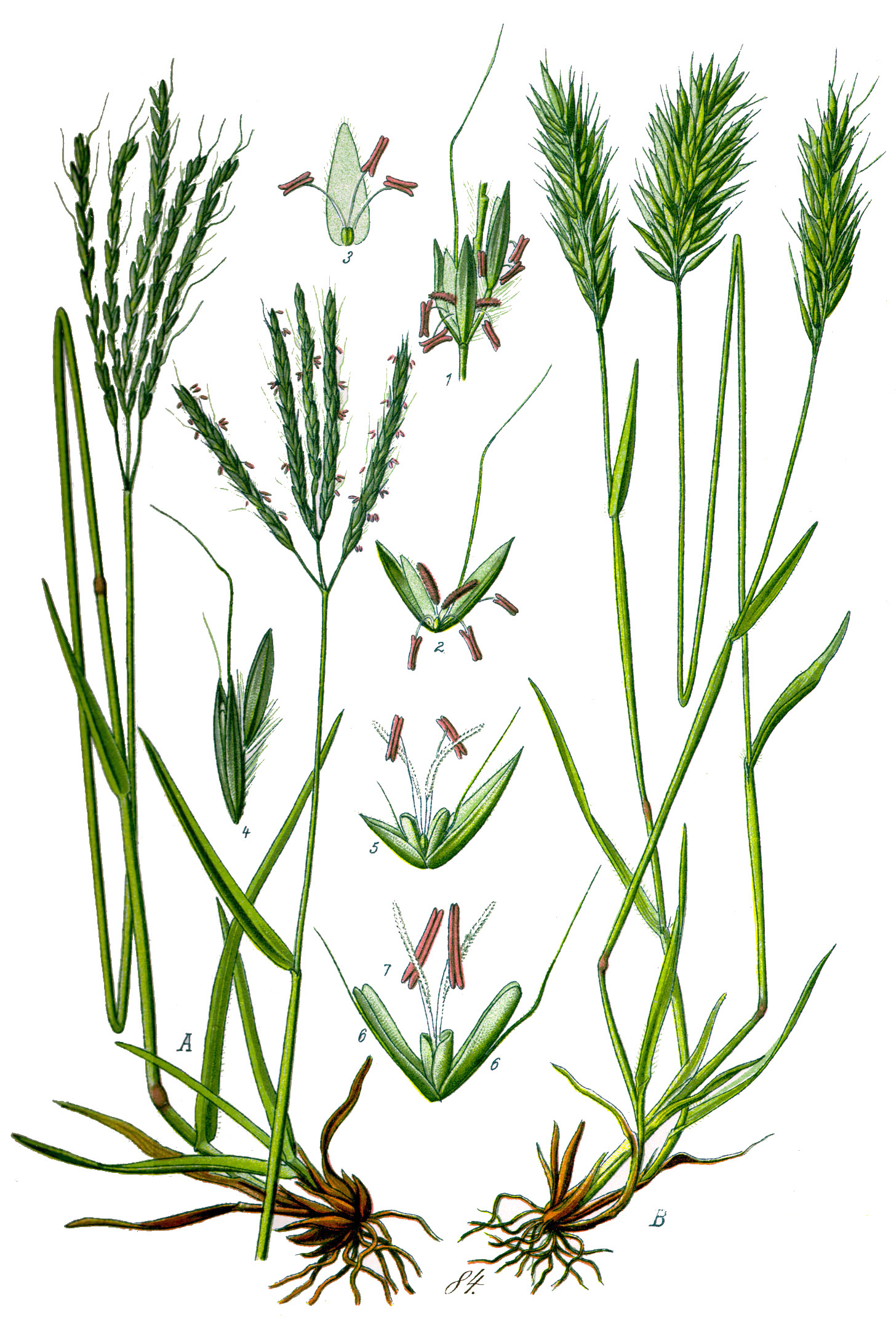 Name Anthoxanthum odoratum ;Family:Poaceae Original book source: Prof. Dr. Otto Wilhelm Thomé Flora von Deutschland, Österreich und der Schweiz 1885, Gera, Germany